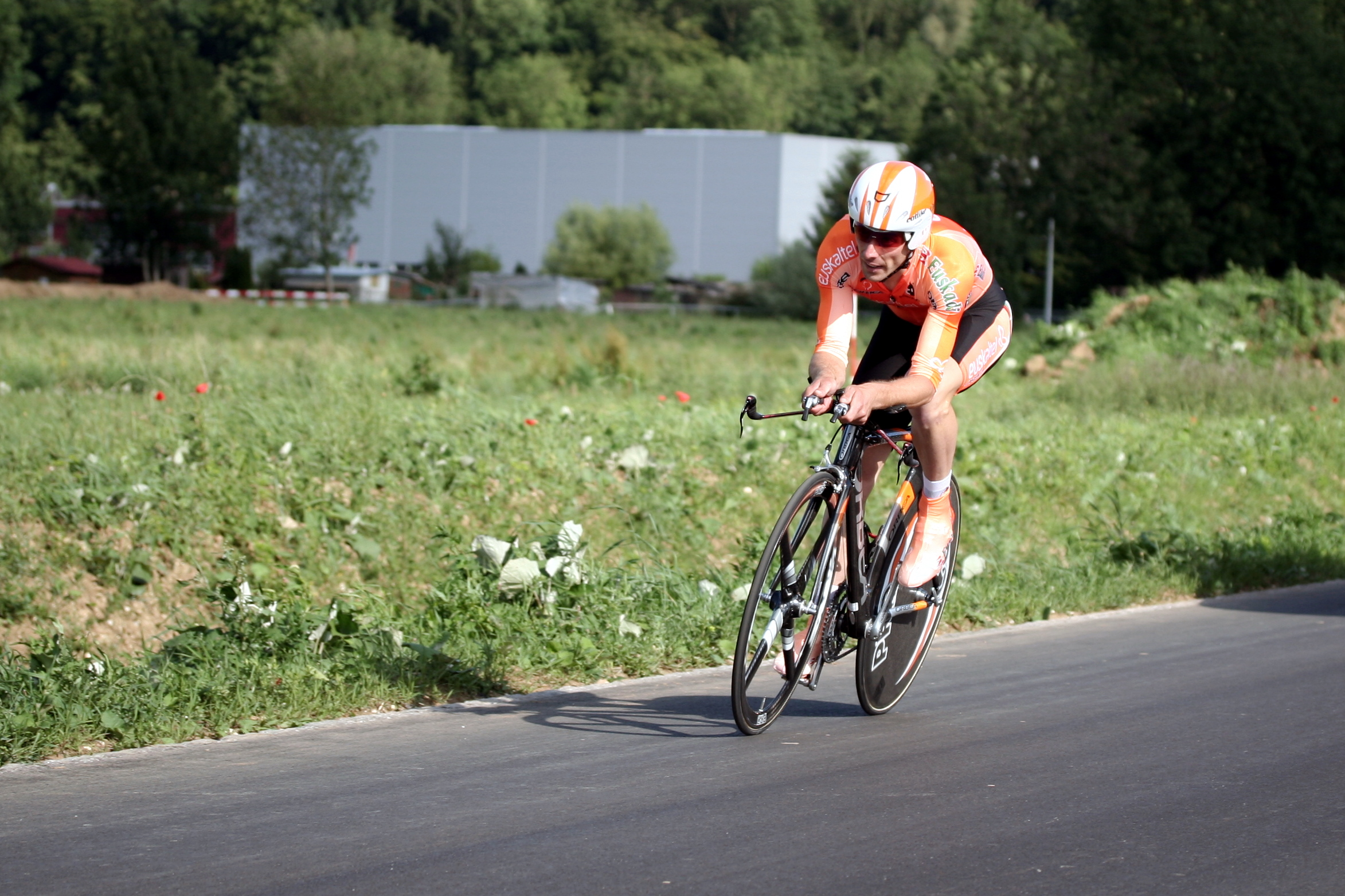 Beñat Albizuri, Olten, Switzerland (Prolog Tour de Suisse 2007)